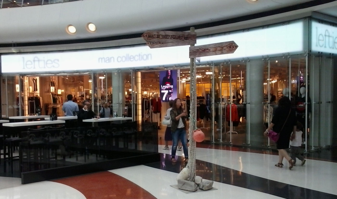 Tenda Marineda City Lefties A Coruña Galiza Spain